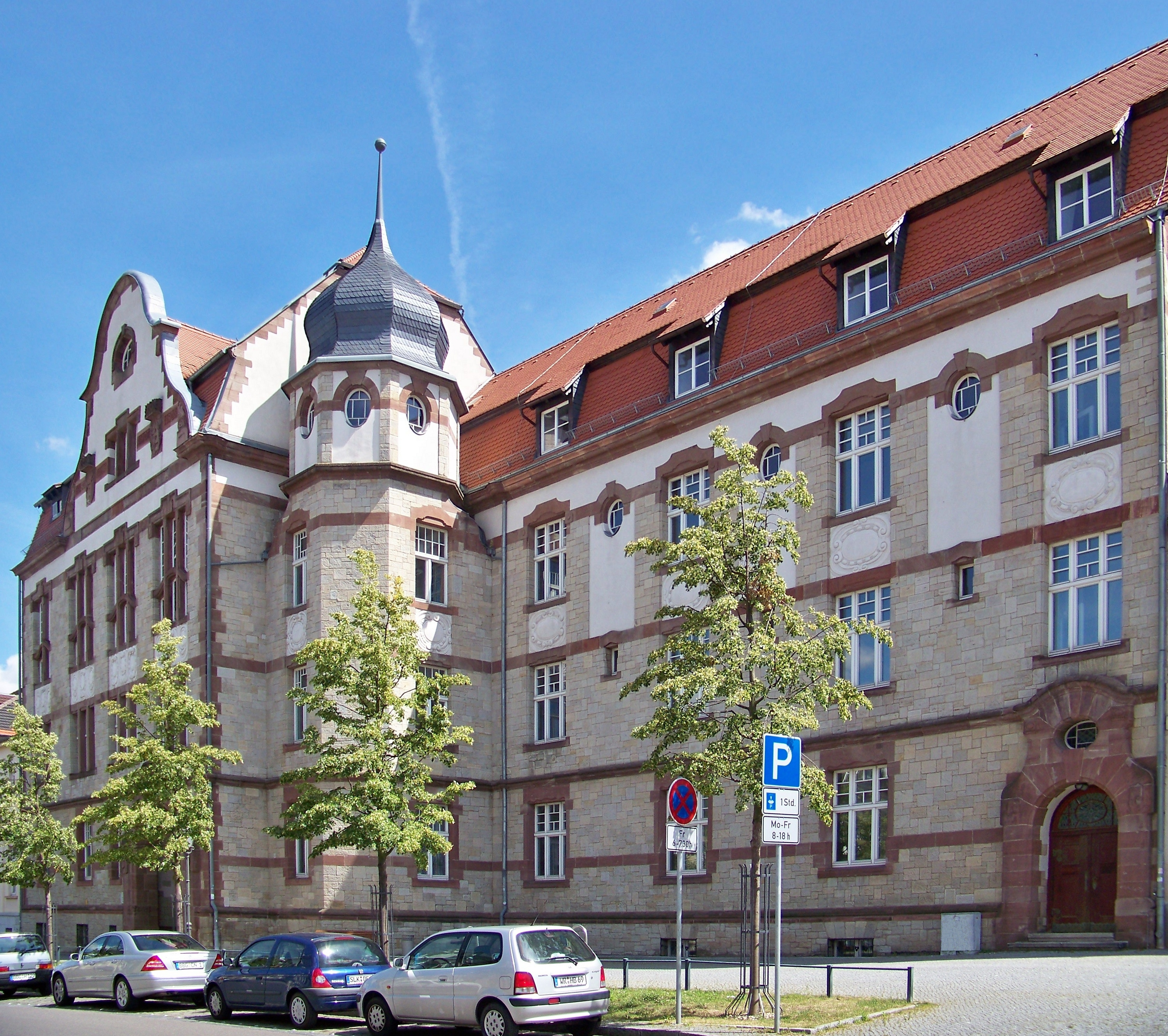 Gymnasium in Bernburg (Saale)